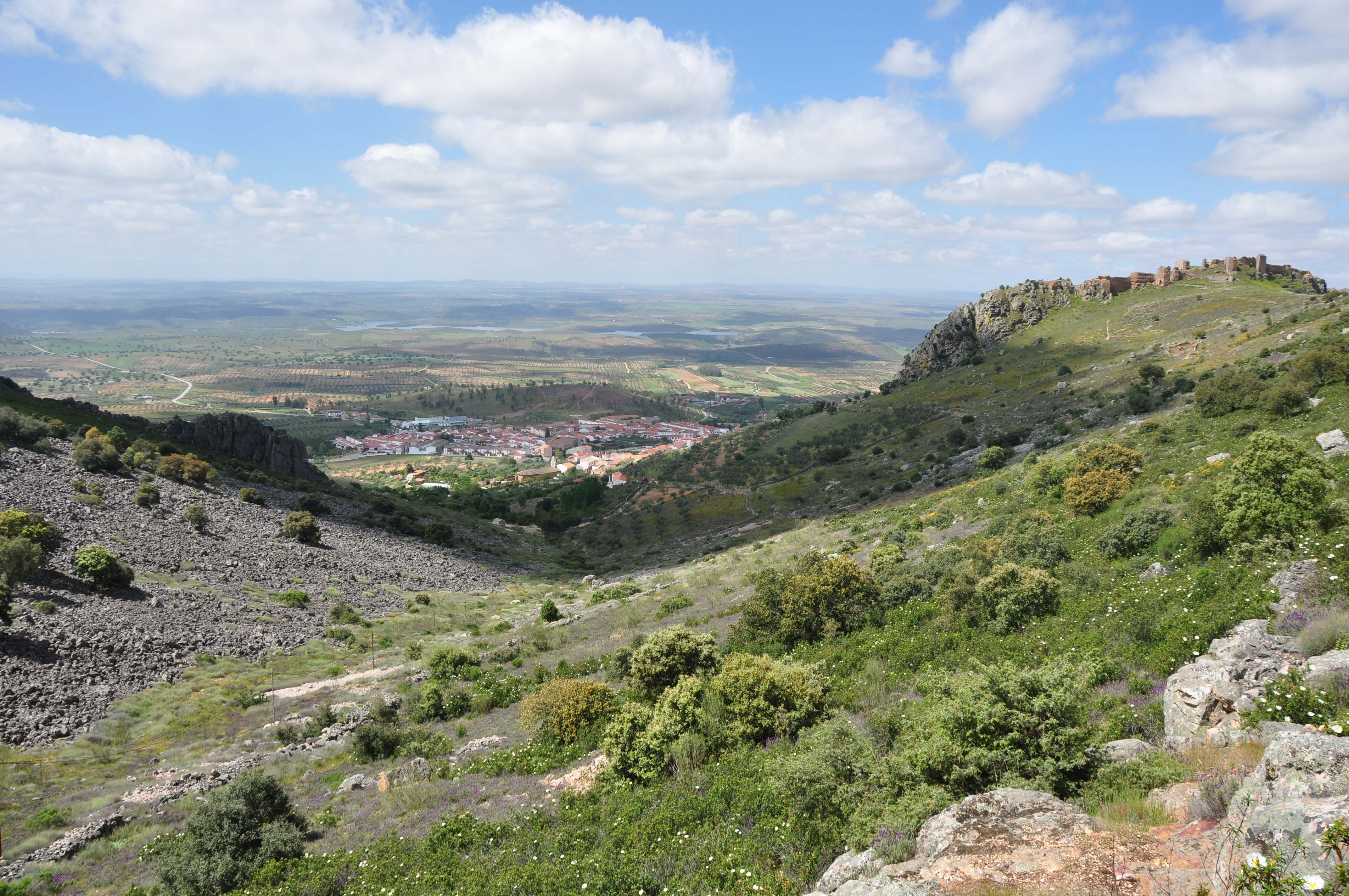 Sierra Grande de Hornachos This is a photography of a Special Area of Conservation in Spain with the ID: ES0000072. Natura2000 entry, EEA entry